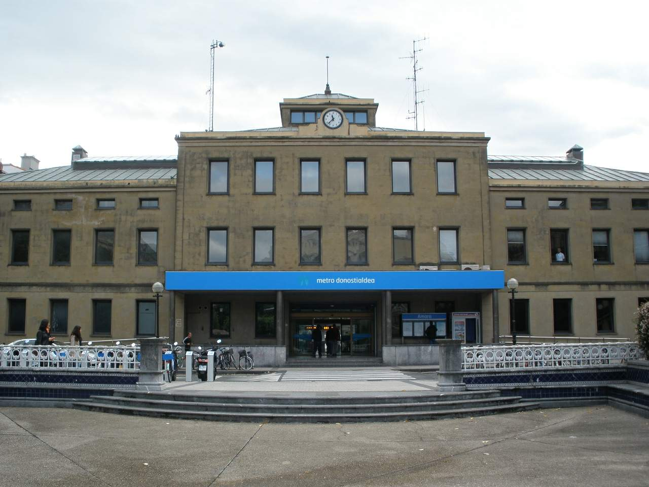 San Sebastian - Estacion de Amara (EuskoTren)